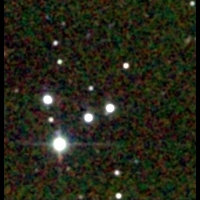 2MASS-Aufnahme von XXXXXX